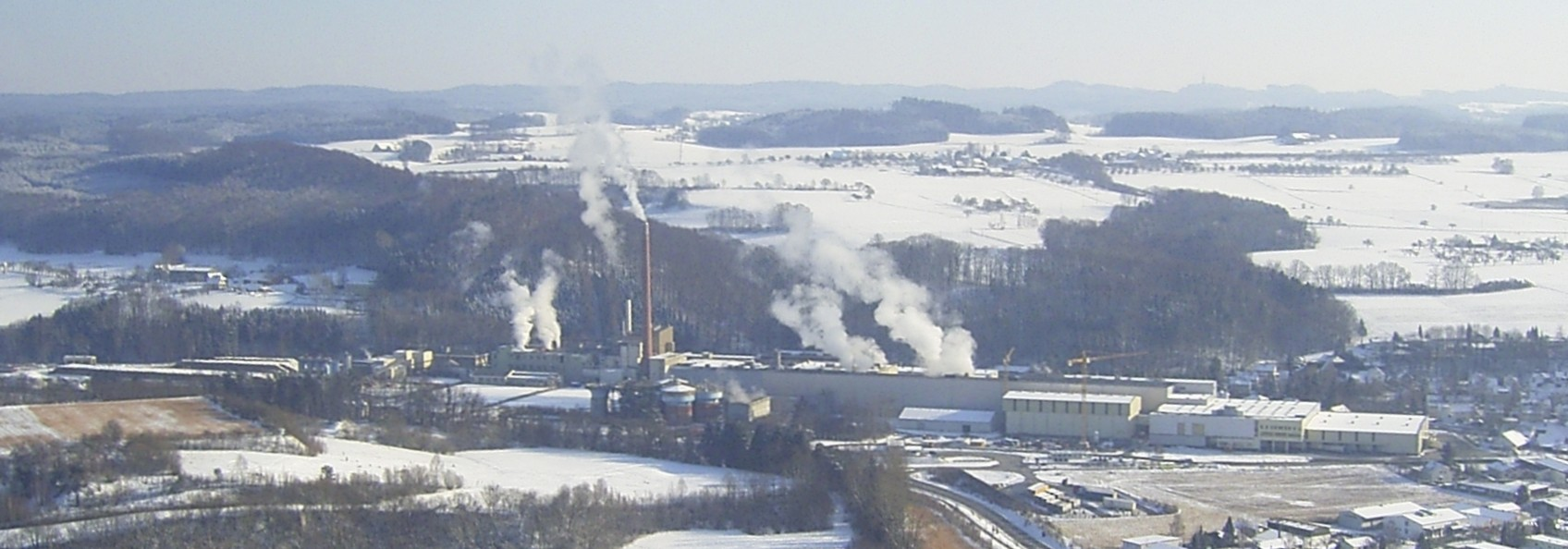 Papierfabrik Baienfurt im Winter